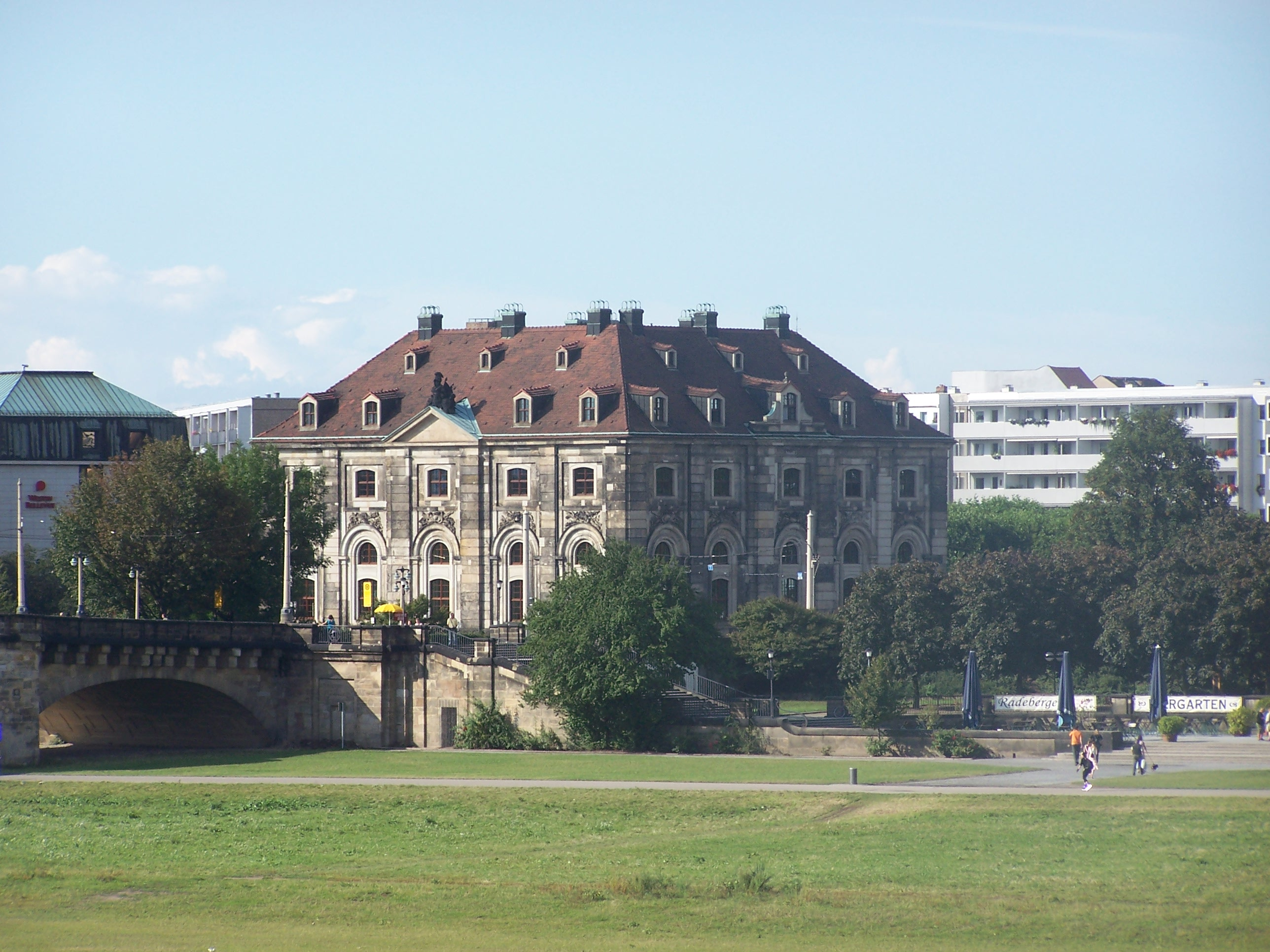 Blockhaus an der Augustusbrücke in Dresden